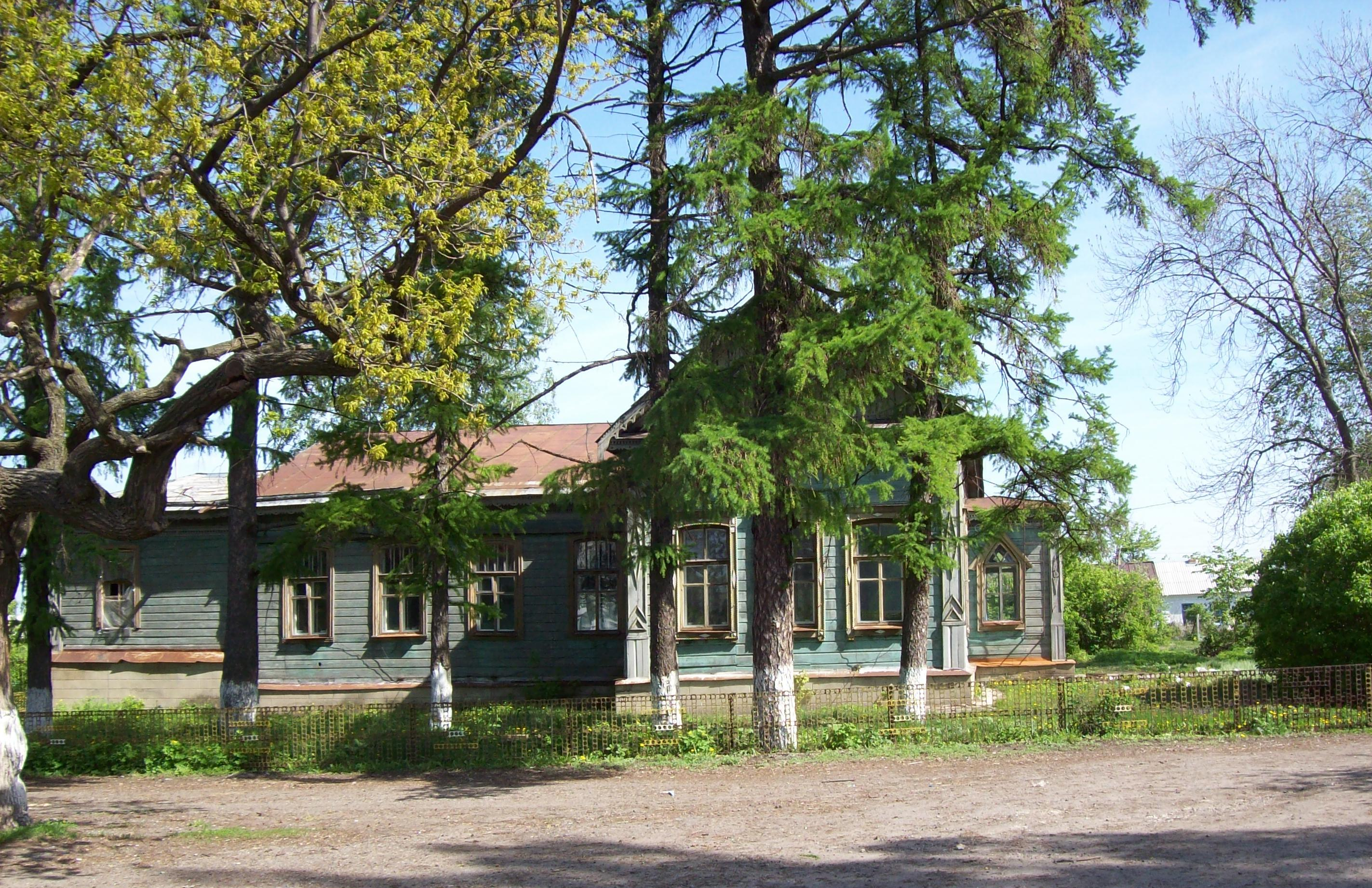 Старинный дом в с.Хлебное Новоусманского района